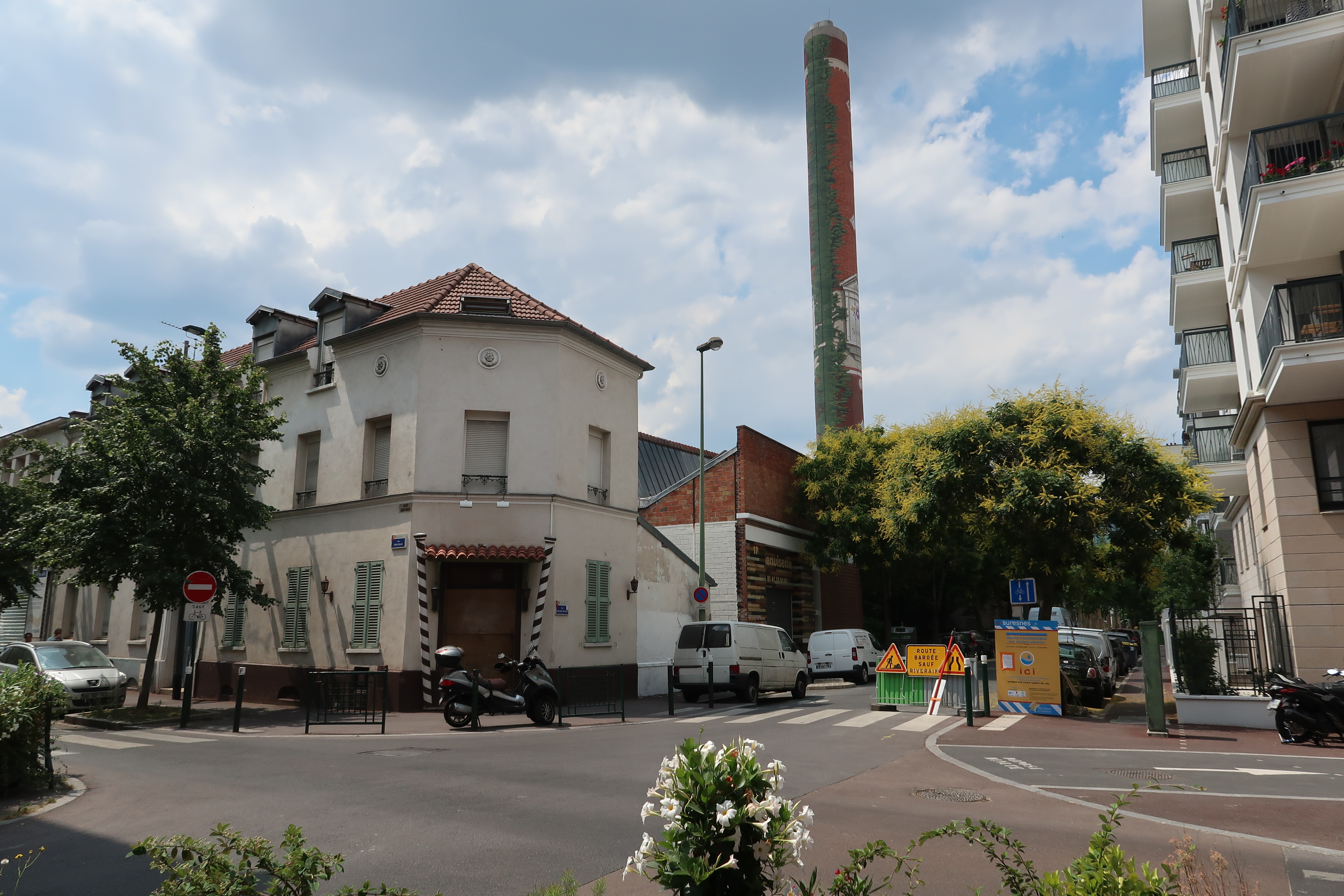 Ancienne usine au 17 rue Édouard-Nieuport (Suresnes, Hauts-de-Seine).